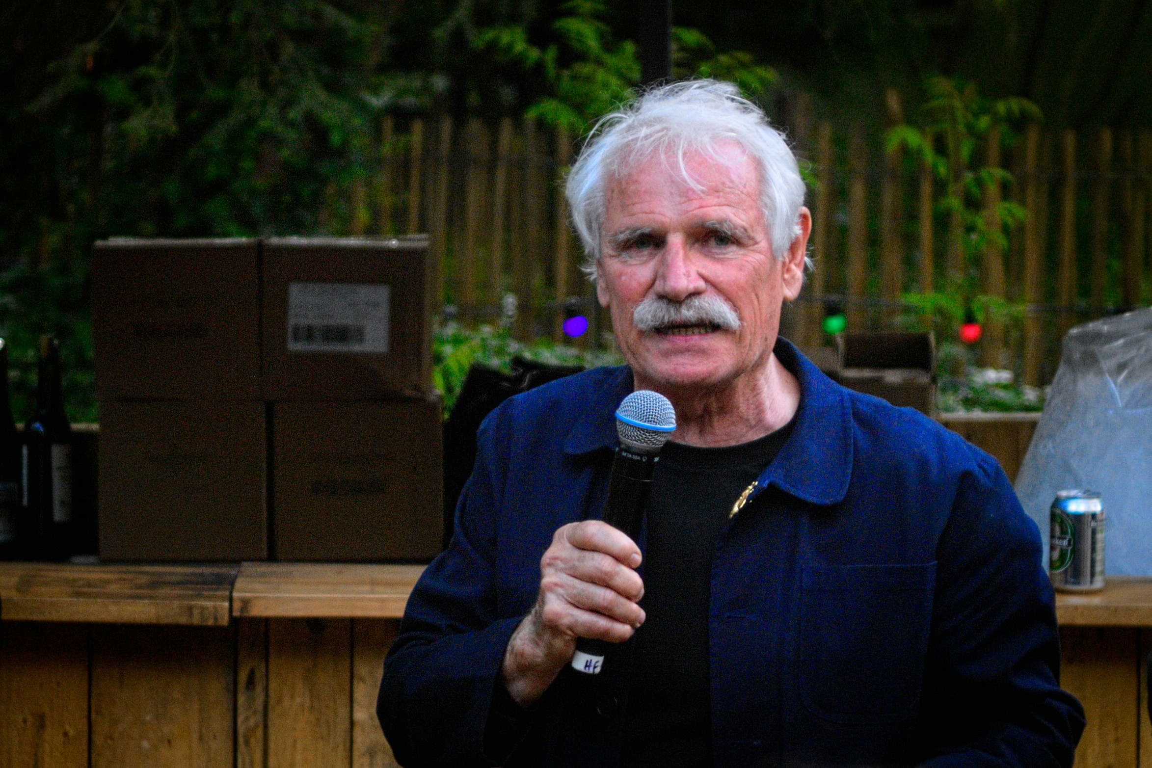 Yann Arthus-Bertrand au Domaine de Longchamp à l'occasion du lancement de GoodPlanet